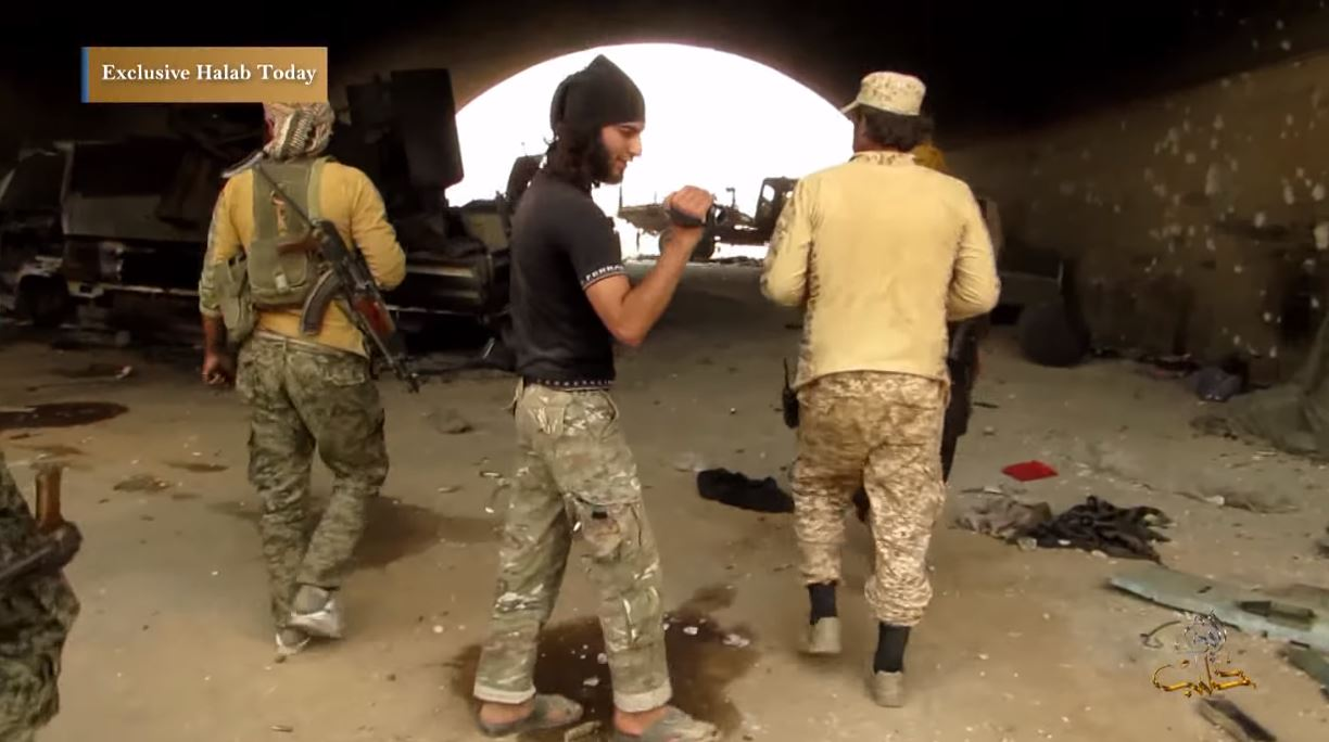 La base aérienne d'Abou Douhour le 11 septembre 2015, après sa prise par le Front al-Nosra, lors de la guerre civile syrienne.